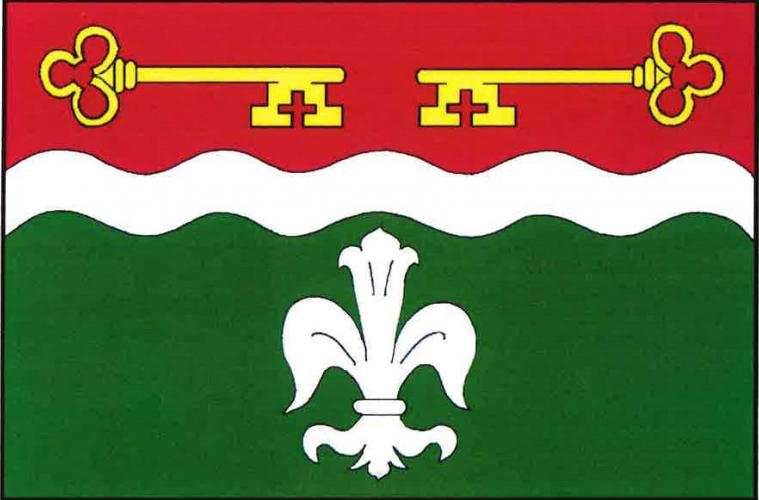 vlajka, Lhoty u Potštejna, okres Rychnov nad Kněžnou